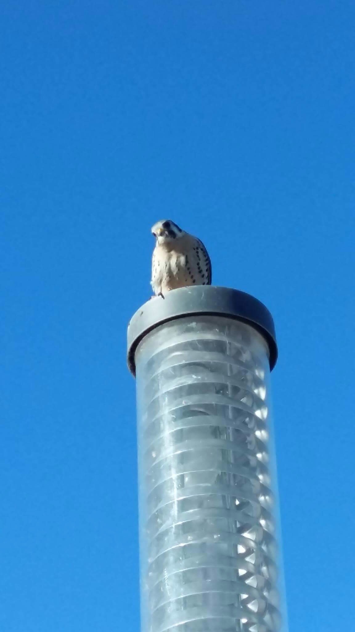 Halcón Colorado, Paseo Costero